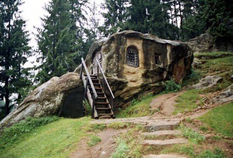 Daniil Sihastrul cave, Romania